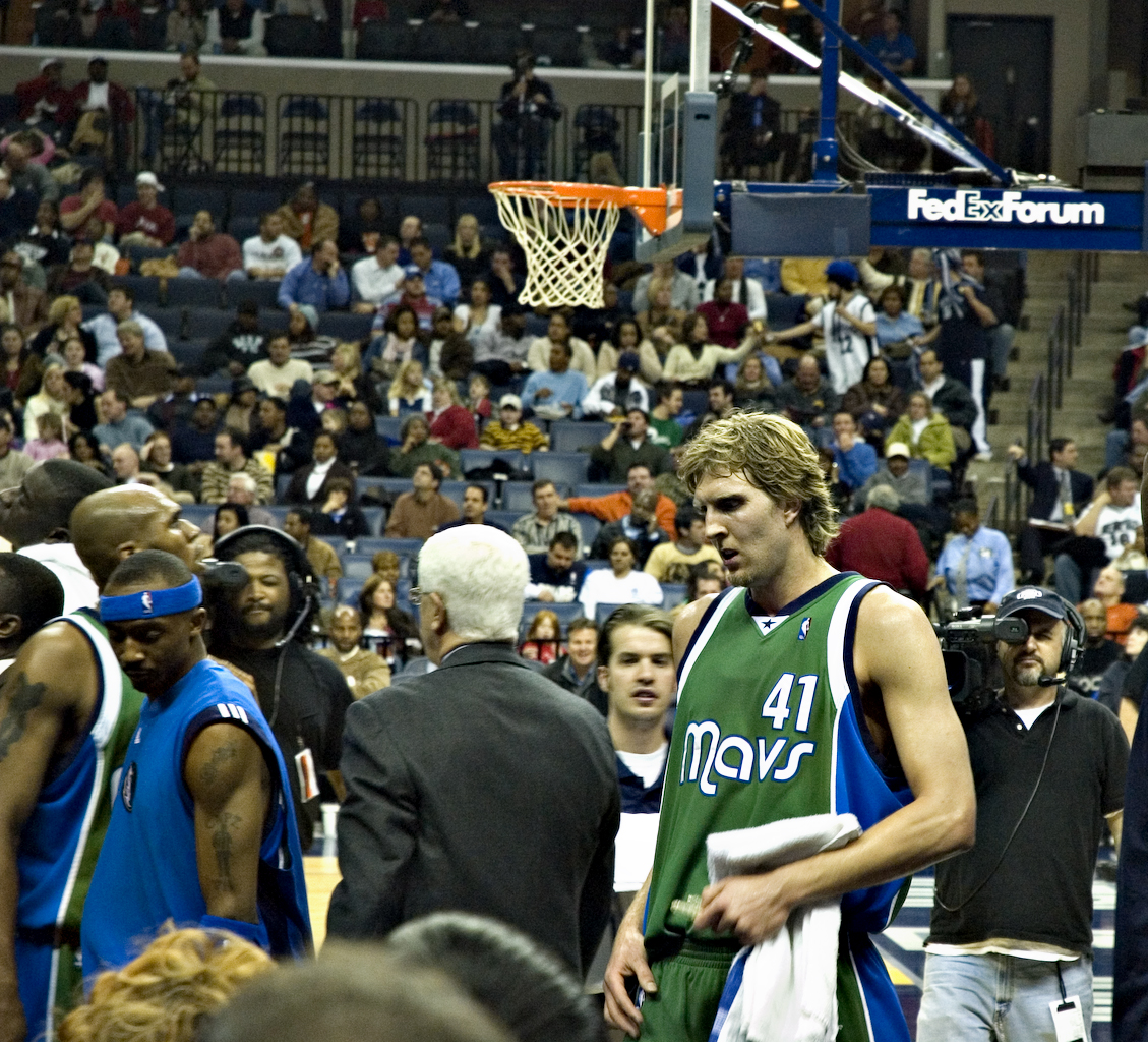 Dirk Nowitzki